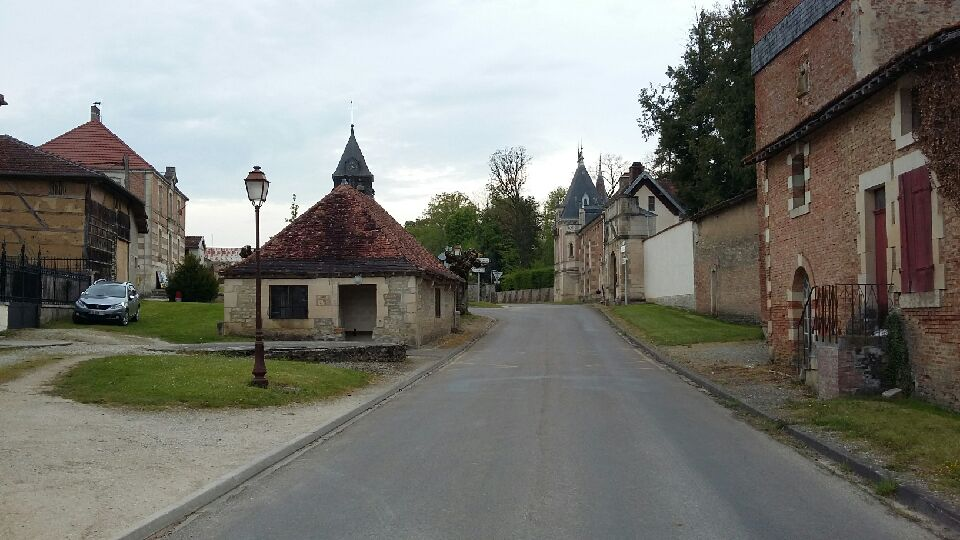 Le centre du village avec la fontaine et l'entrée du château